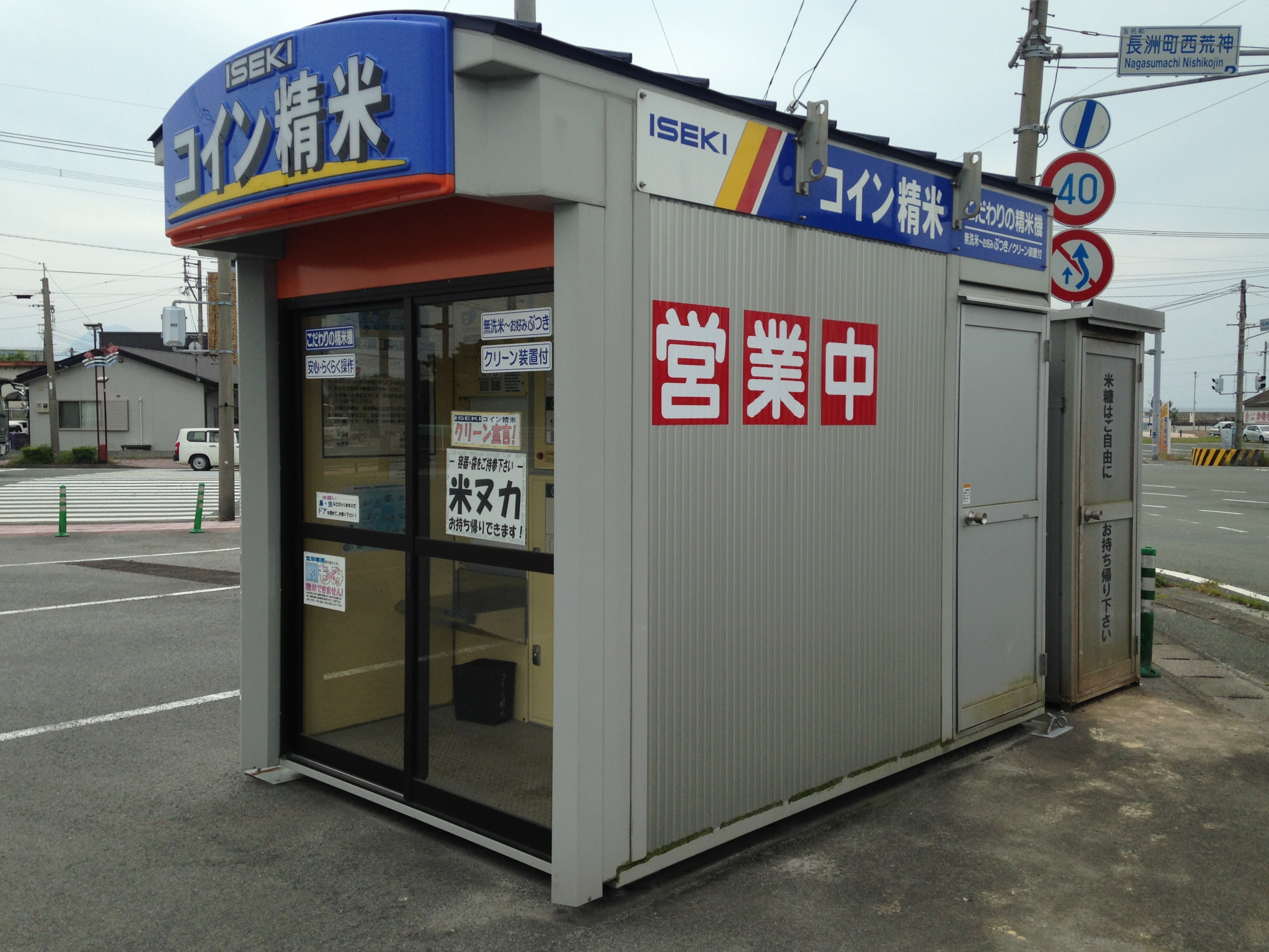 長洲港付近のヰセキ・コイン精米機